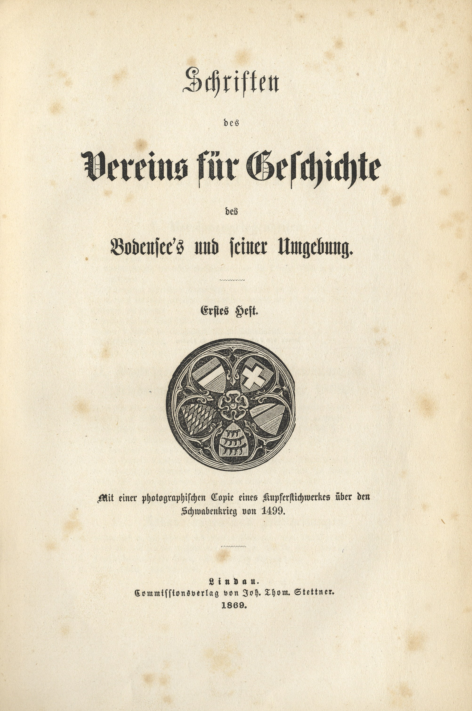 Schriften des Vereins für Geschichte des Bodensees und seiner Umgebung, Titelblatt des ersten Hefts von 1869, erschienen im Kommissionsverlag von Johann Thomas Stettner und gedruckt von Johann Baptist Thoma in Lindau.